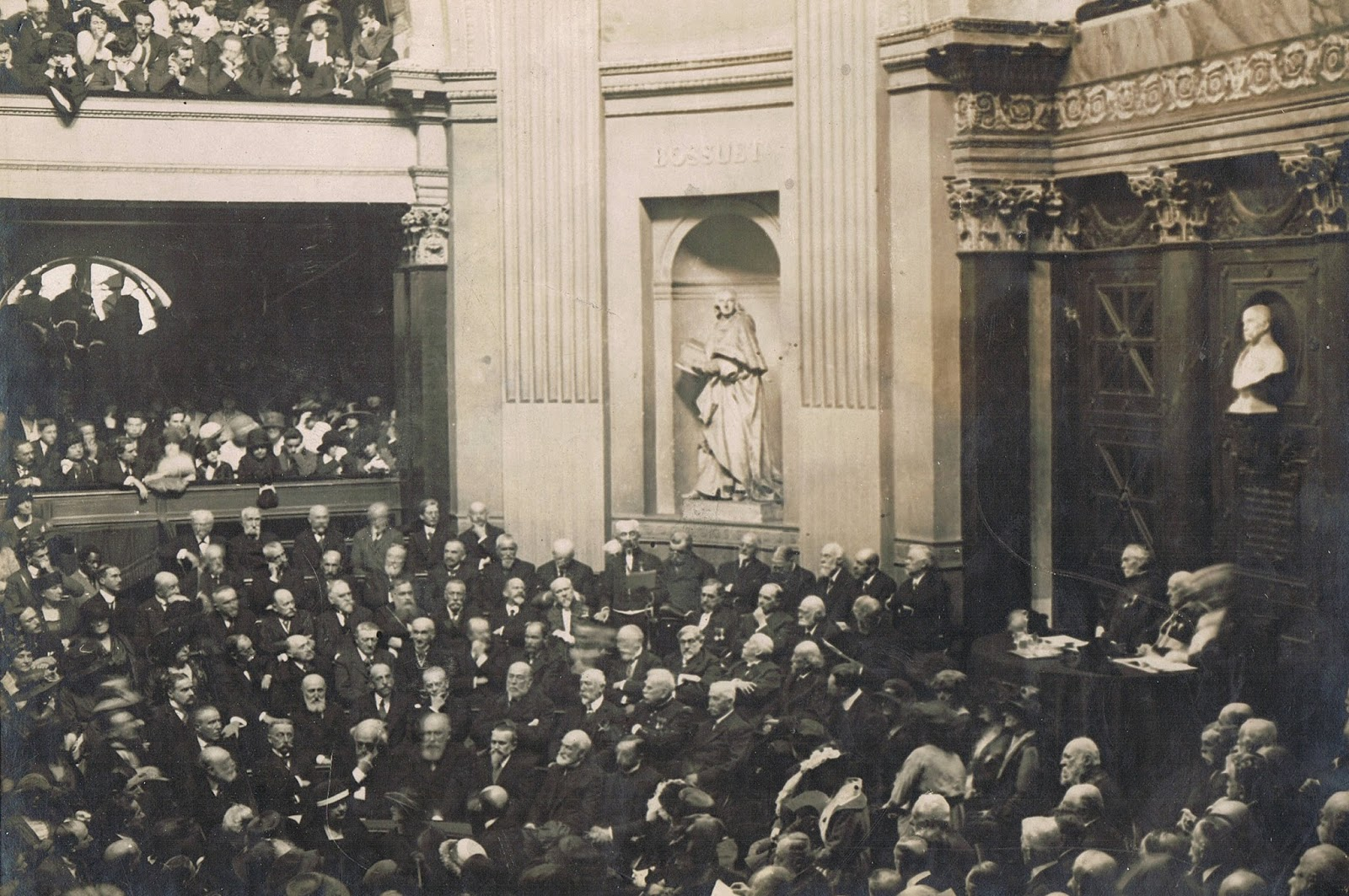 L'historien Louis Duchesne (1843-1922) recevant son ami le maréchal Lyautey à l'Académie Française.